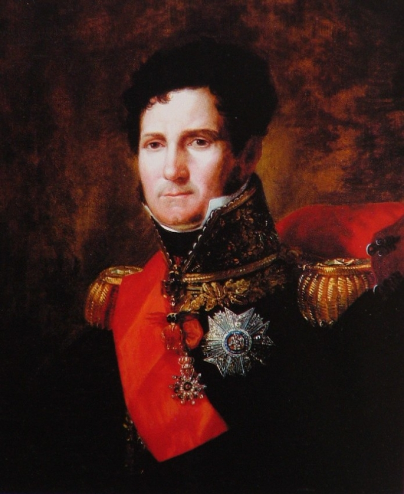 Le général Félix Baciocchi (1762-1841), prince de Lucques et de Piombino.